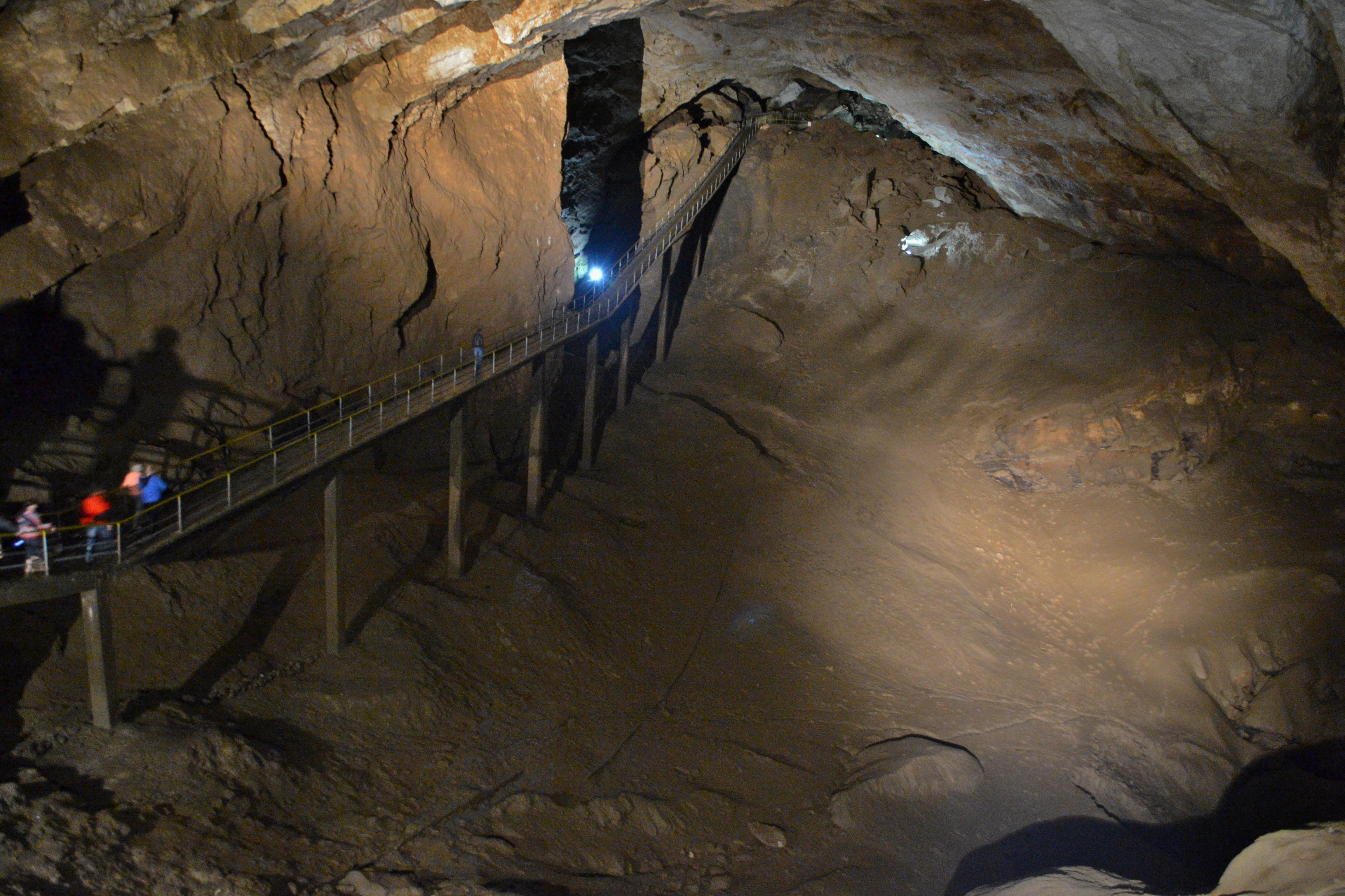 Одна из Новоафонских пещер.